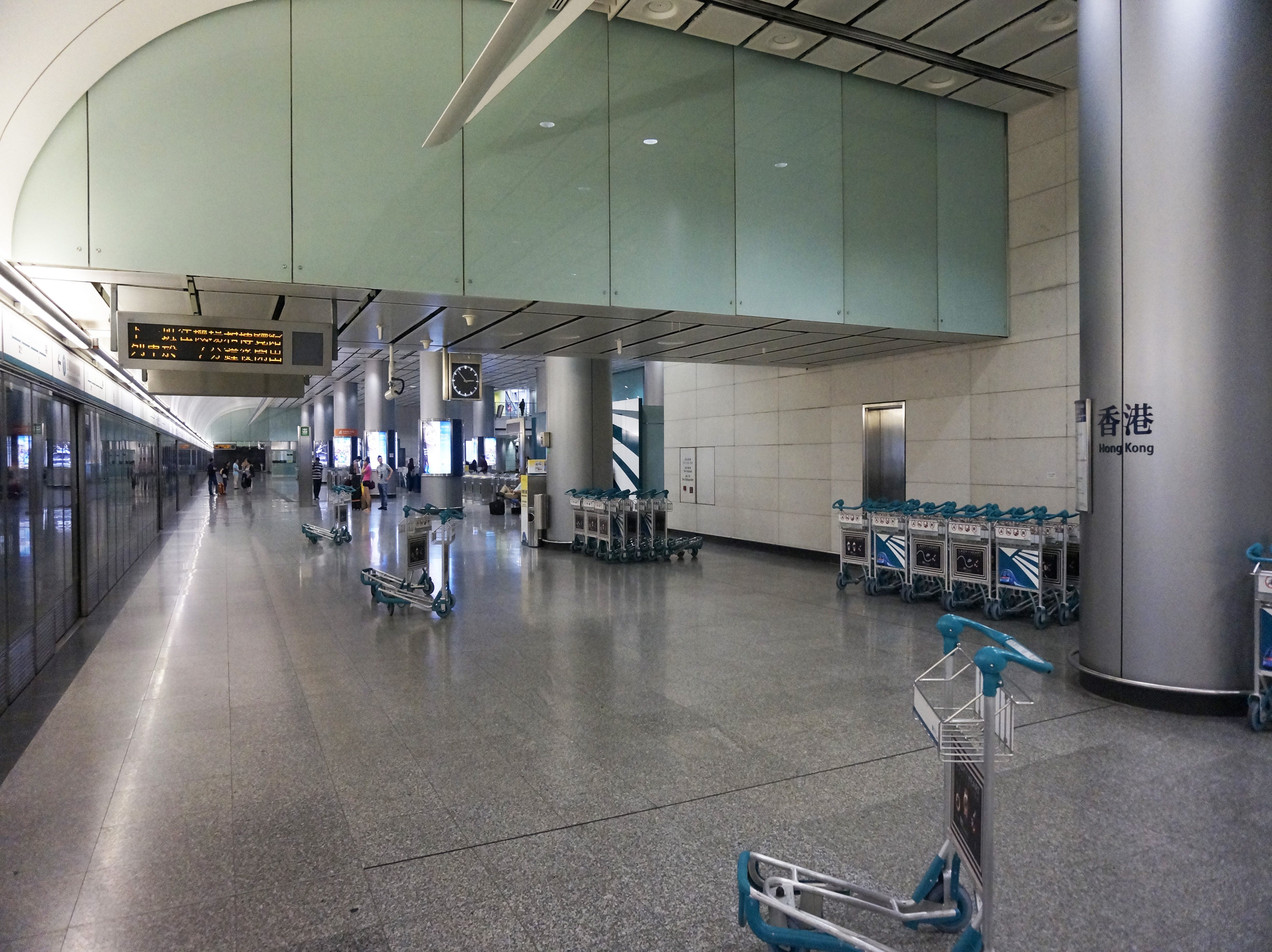 港鐵香港站月台